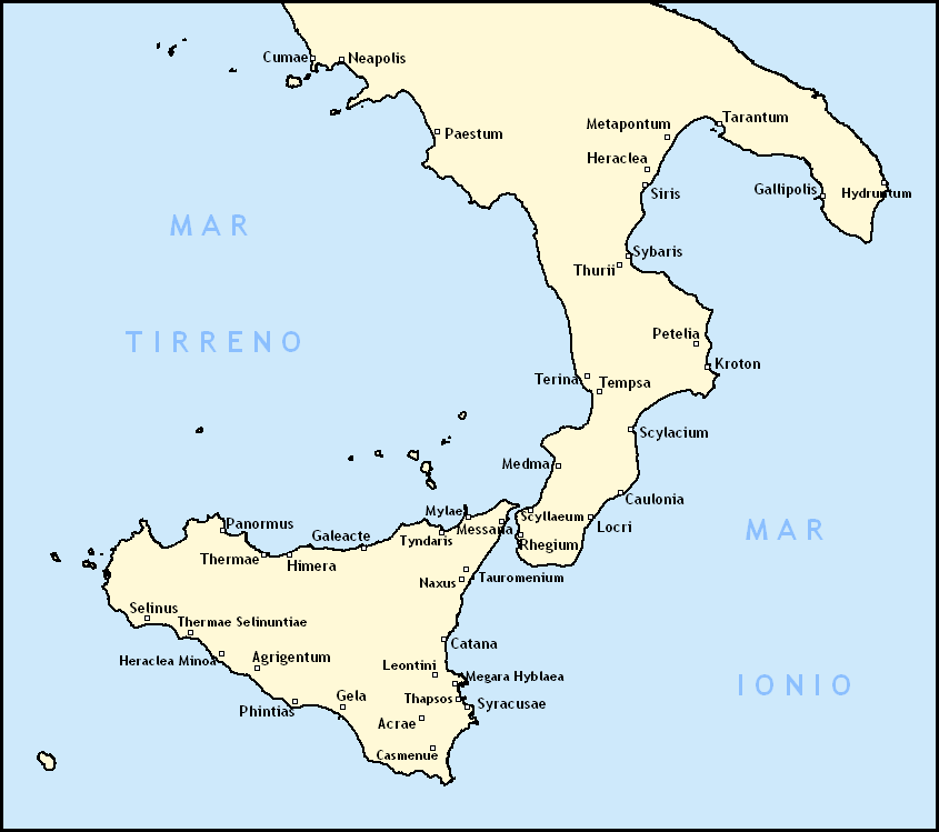 Colonie d'origine grecque en Italie méridionale et en Sicile. Noms latins.